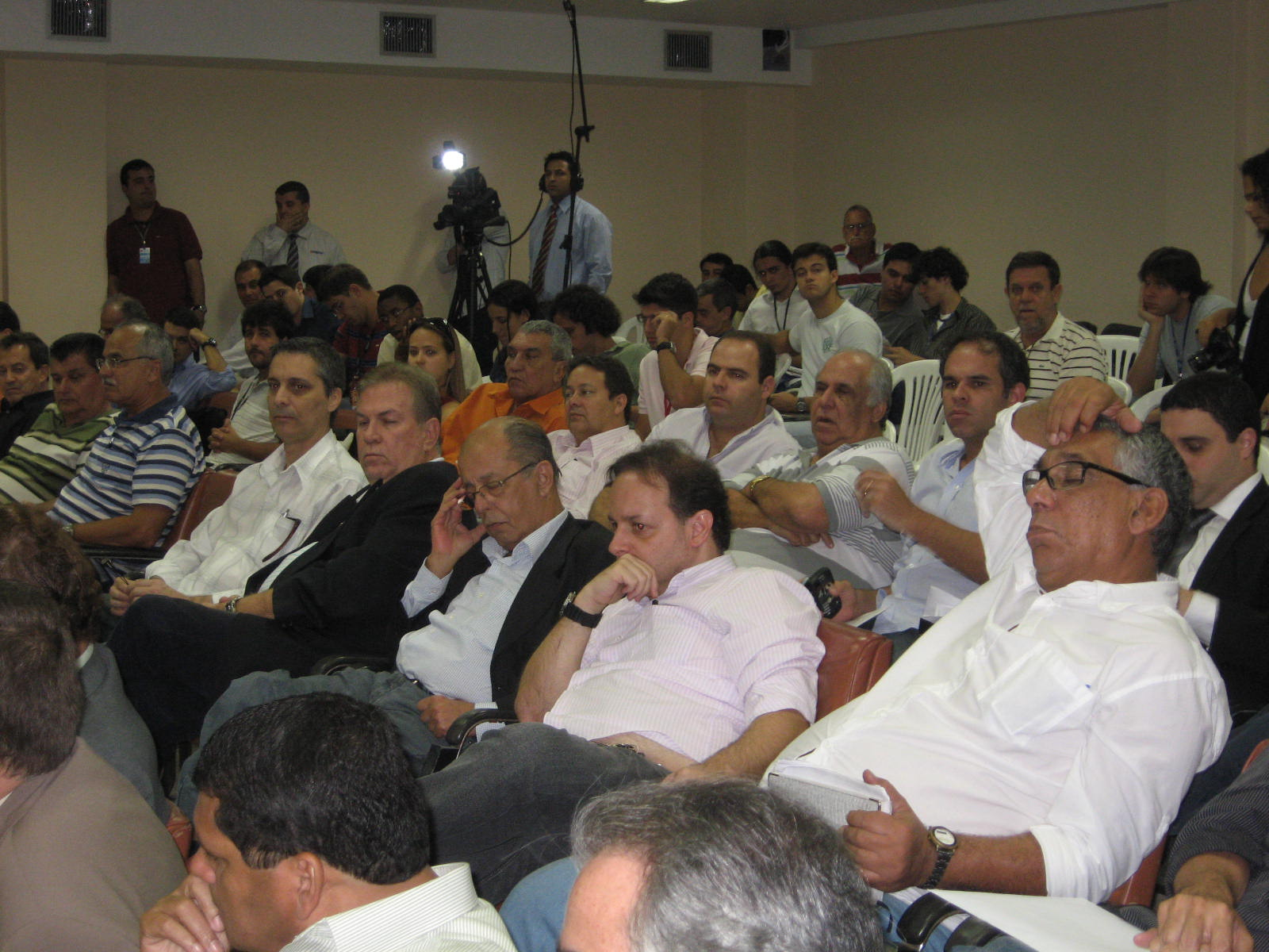 Reunião do conselho arbitral da primeira divisão do Rio de Janeiro.